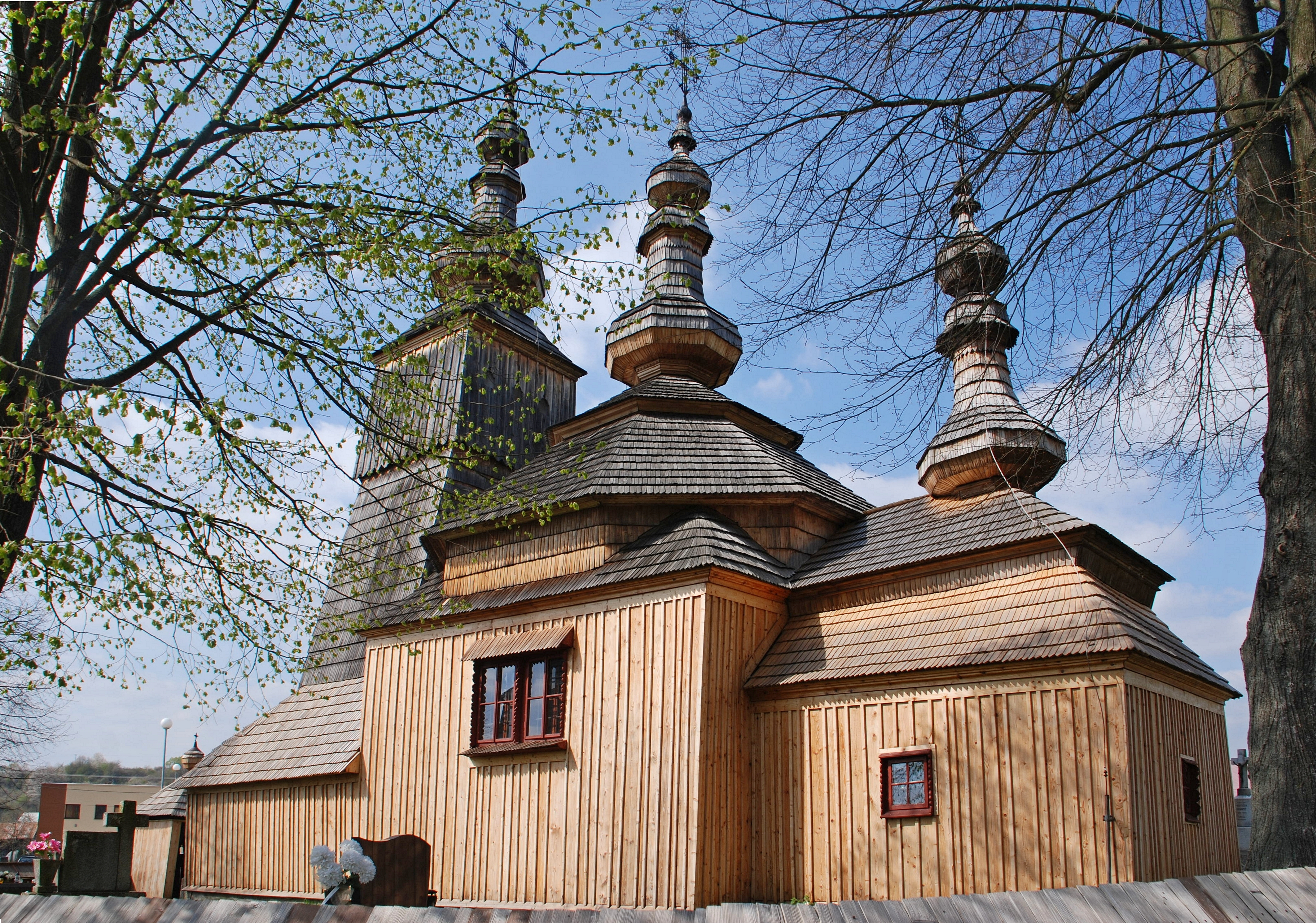 wieś Ladomirová